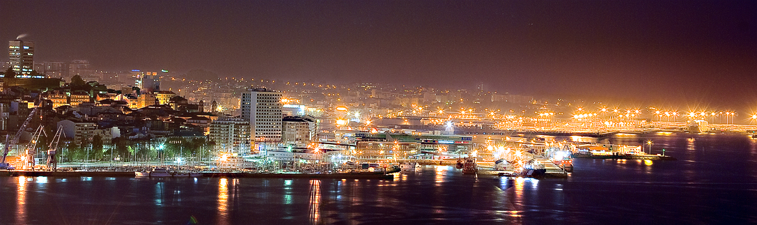 Vigo, Galiza, España